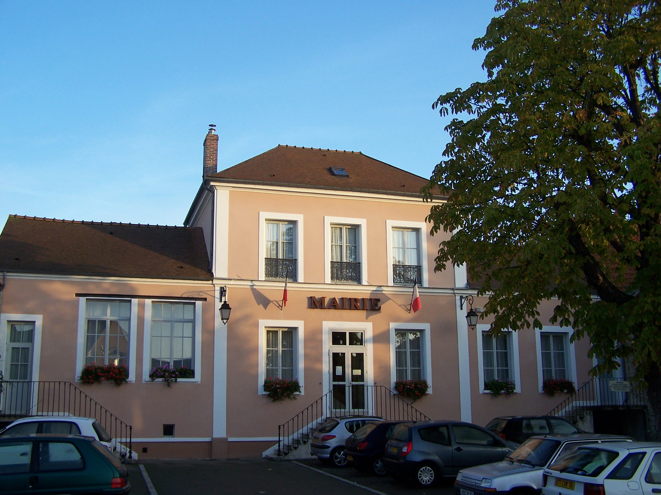 Mairie du Tremblay-sur-Mauldre (Yvelines, France)